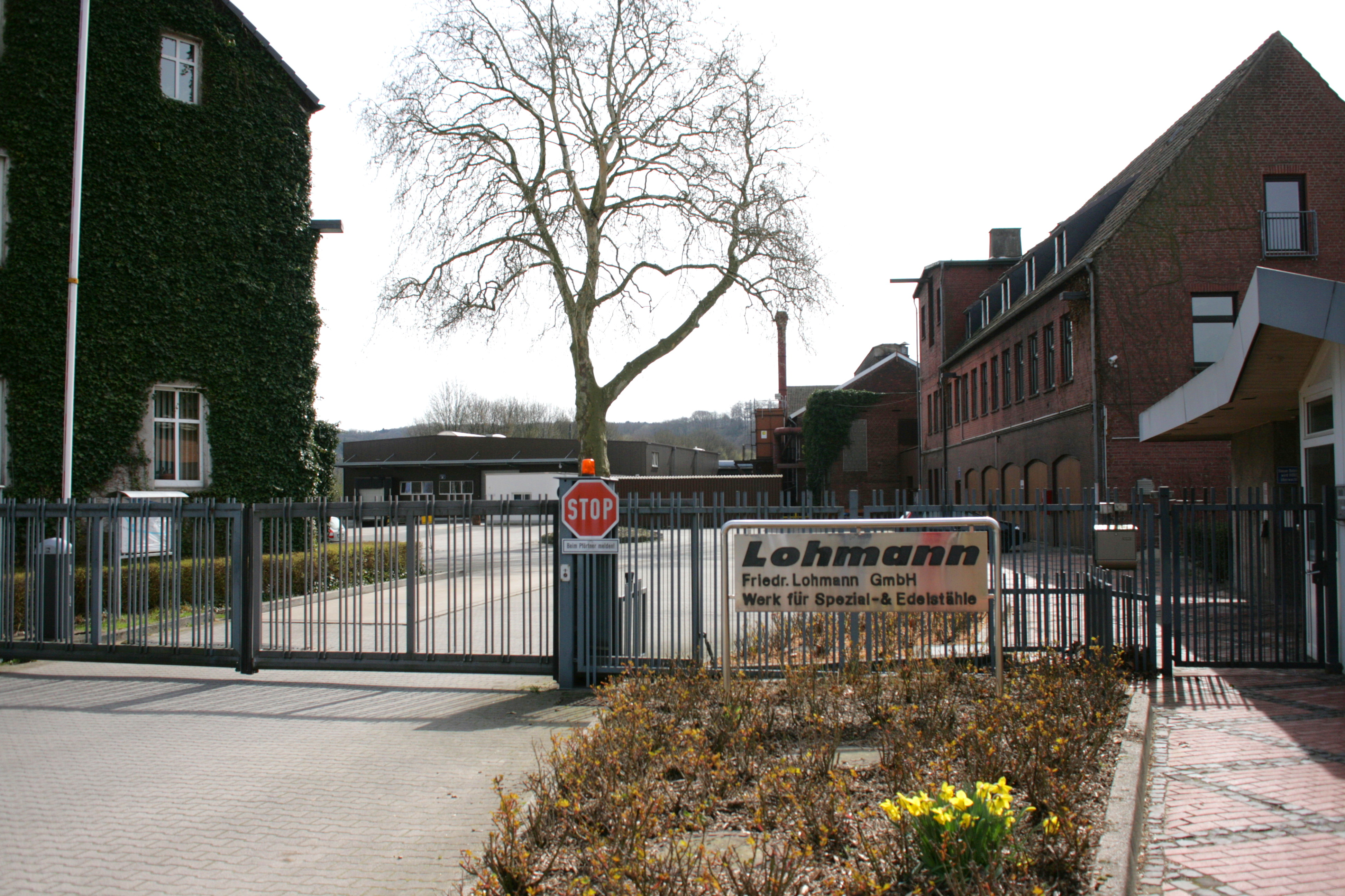 Friedr. Lohmann GmbH, Ruhrtal in Witten-Herbede